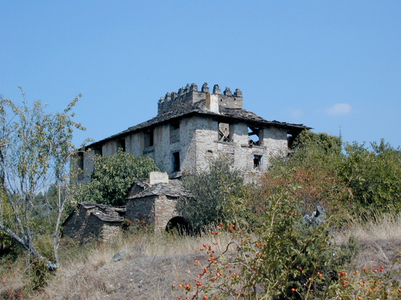 vivienda en primer término con torre cuadrada que sobresale en altura por detrás